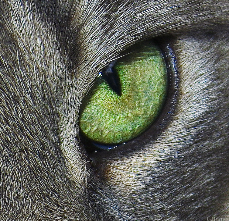 cats eye